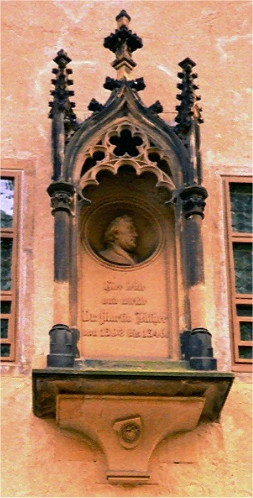 Abbild Luthers am Lutherhaus in Wittenberg (Text: Hier lebte und wirkte Dr. Martin Luther von 1502 bis 1546)